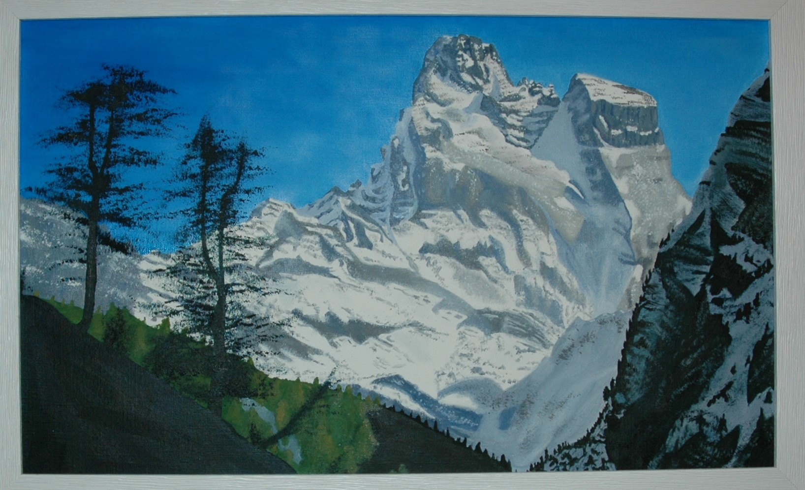 Huile sur toile représentant le Mont-Viso au début de l'été, depuis le grand belvédaire du Mont-Viso, au dessus d'Abriès